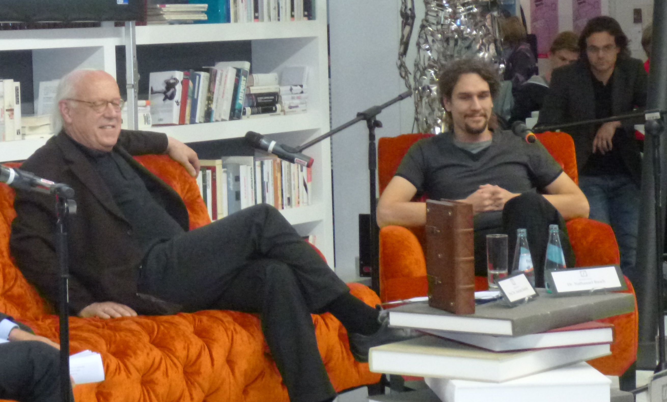 La literaturhistoriistoj Joachim Heinzle kaj Nathanael Busch publike disputas en la Frankfurta librofoiro 2012